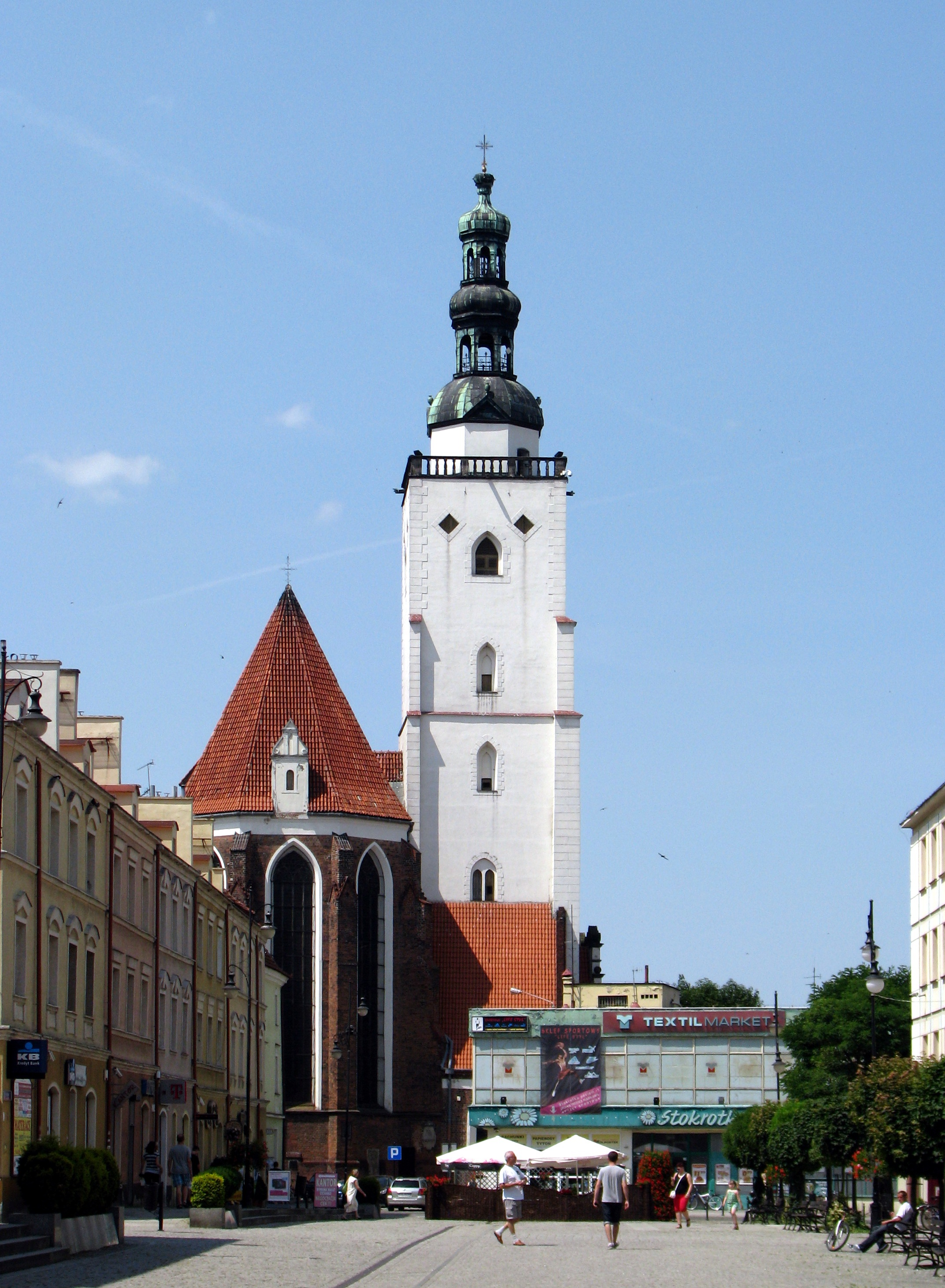 Bazylika św. Jana Apostoła w Oleśnicy, z końca XIII, XIV, XVI, początku XX w. Widok od strony rynku.